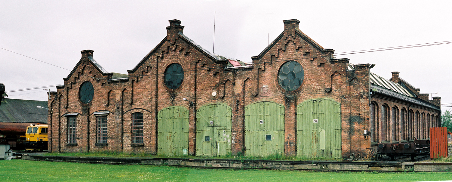 Hamar jernbaneverksted. Bygd 1915.